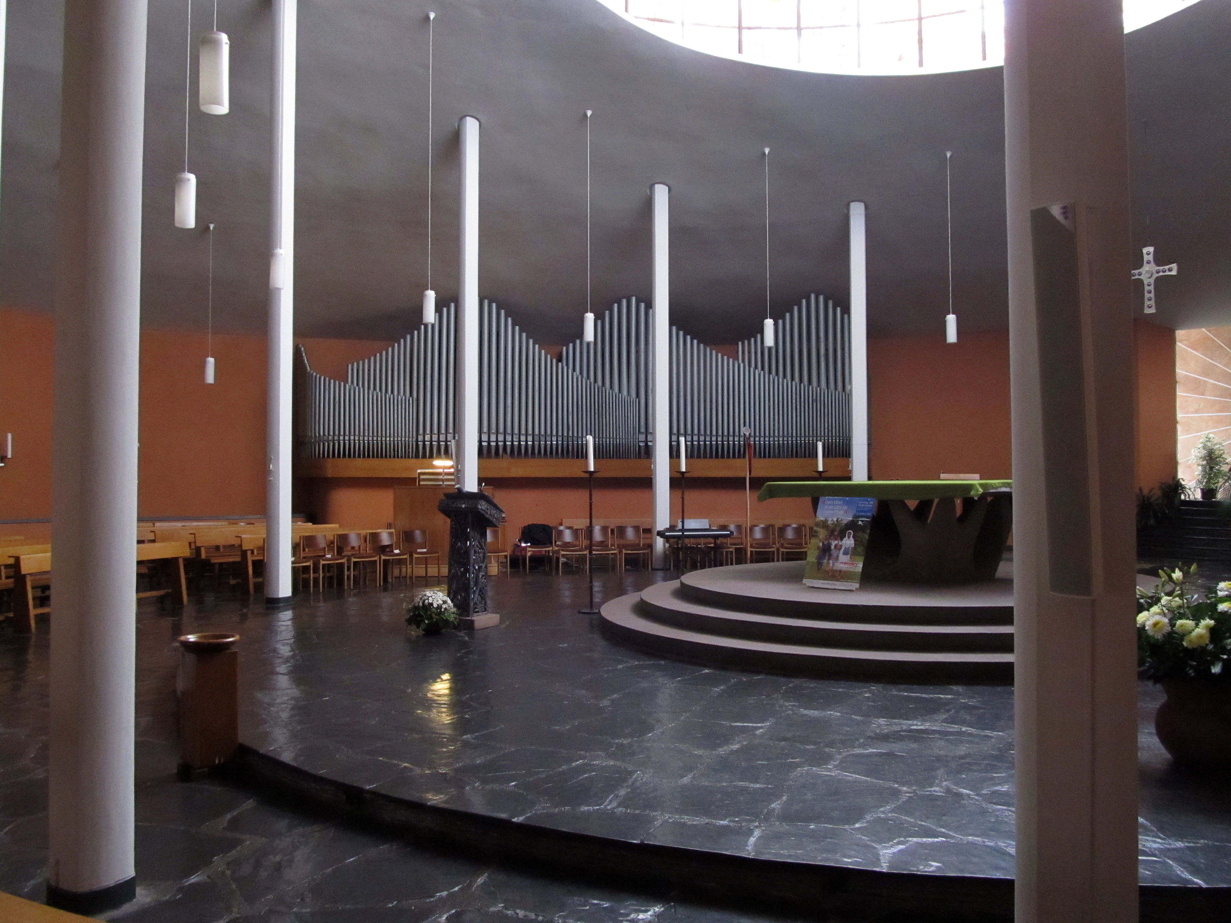 Blick ins Innere der katholischen Pfarrkirche St. Albert in Saarbrücken-Rodenhof, Saarland